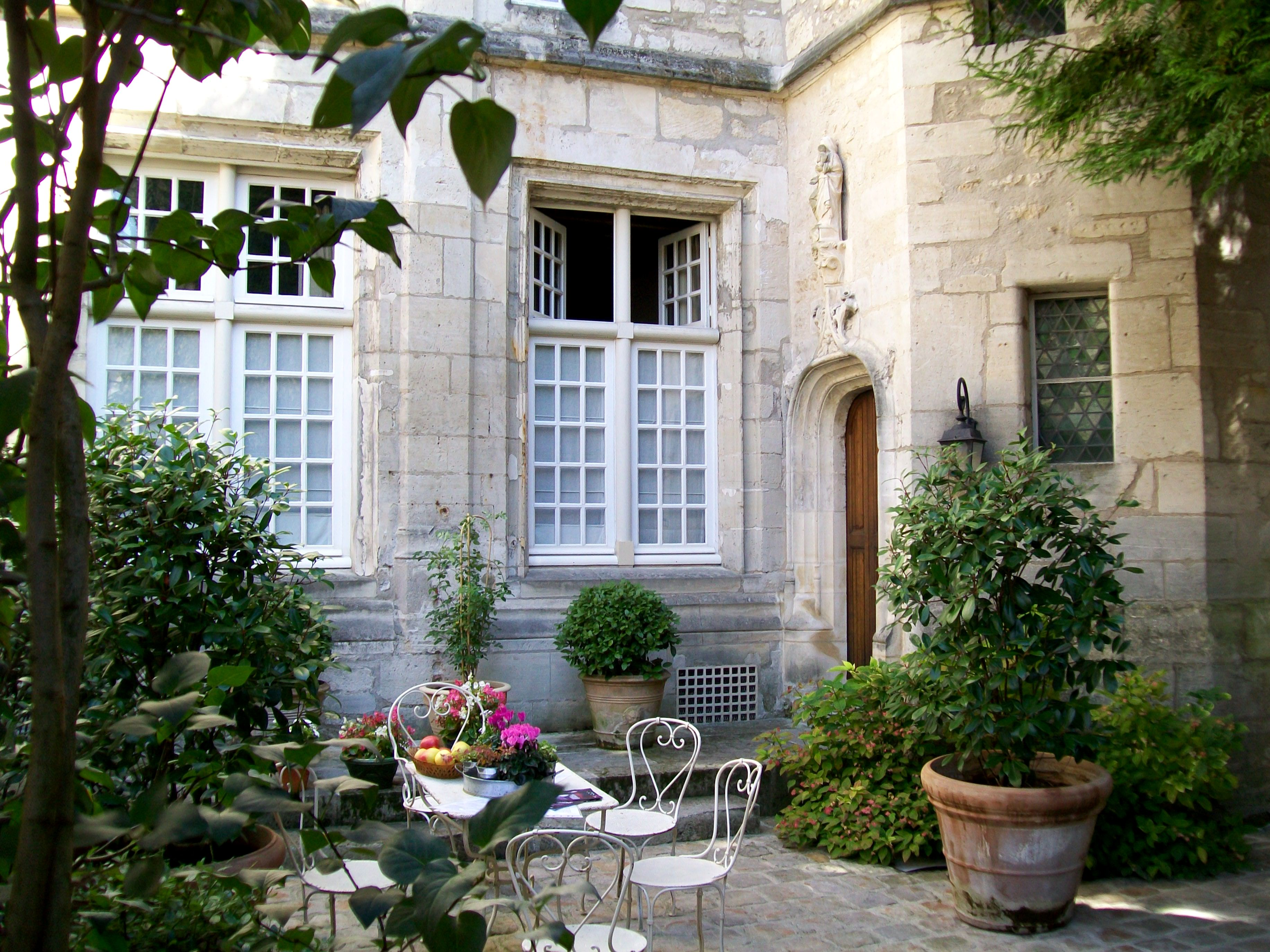 Le « logis du Haubergier », hôtel particulier de 1522 qui a abrité le musée régional d'archéologie et d'histoire entre 1927 et 1982. La tour, endommagée par un obus allemand en 1940, a étéreconstruite à partir de 1952.